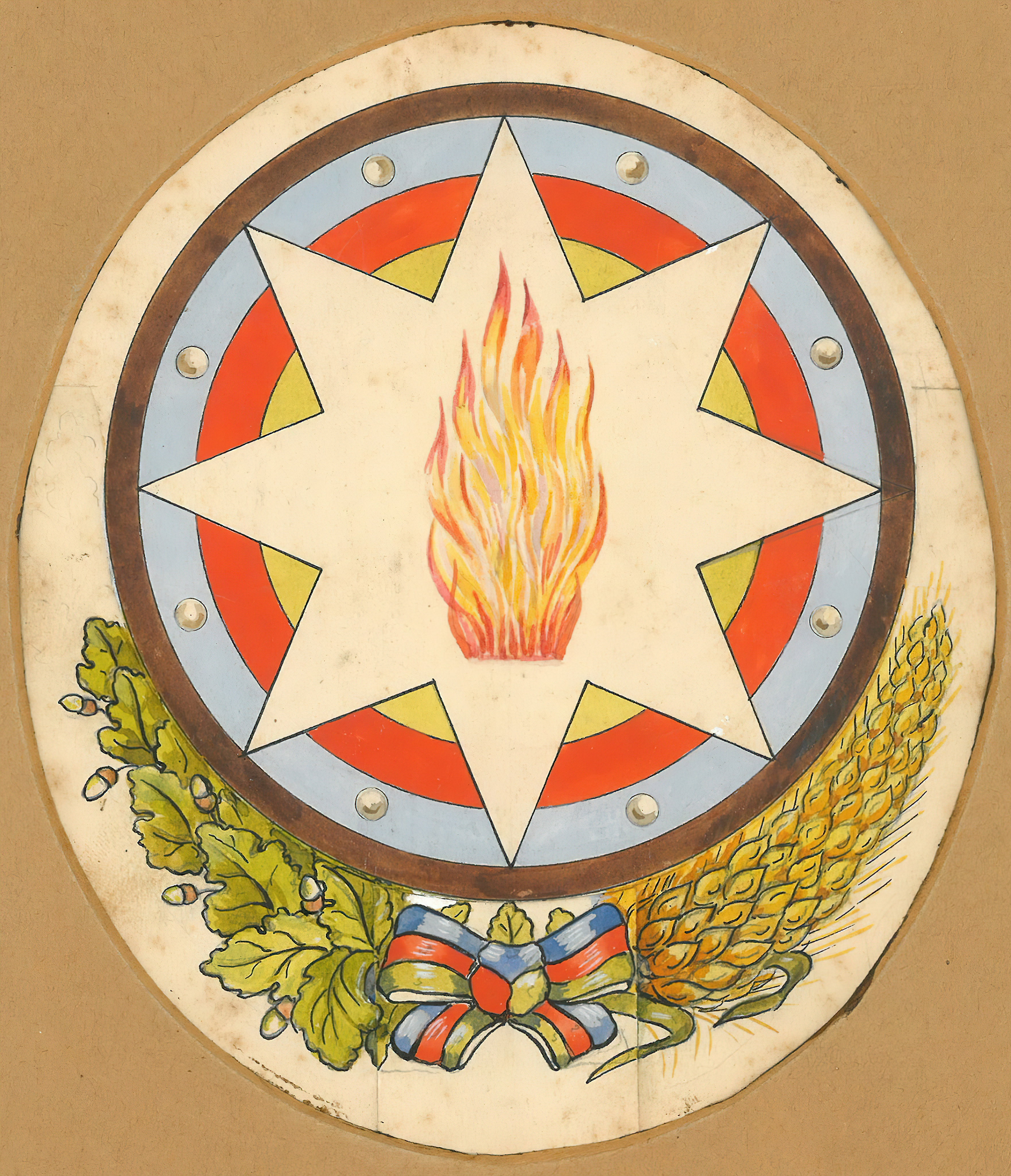 Azərbaycan gerbi